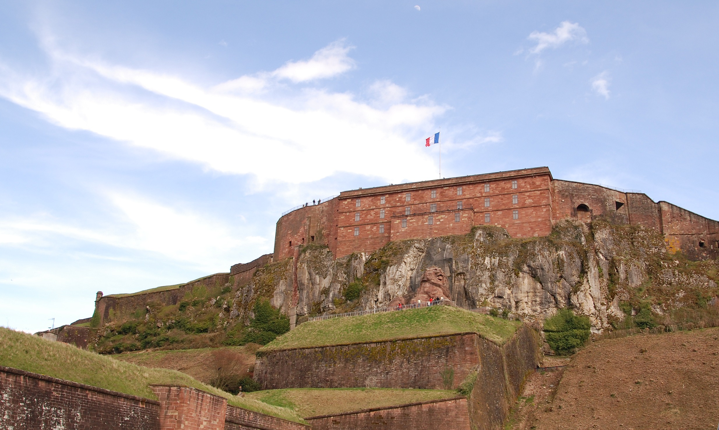 Zitadelle in Belfort, Frankreich